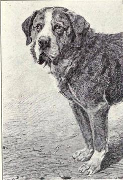 Medelan from 1915